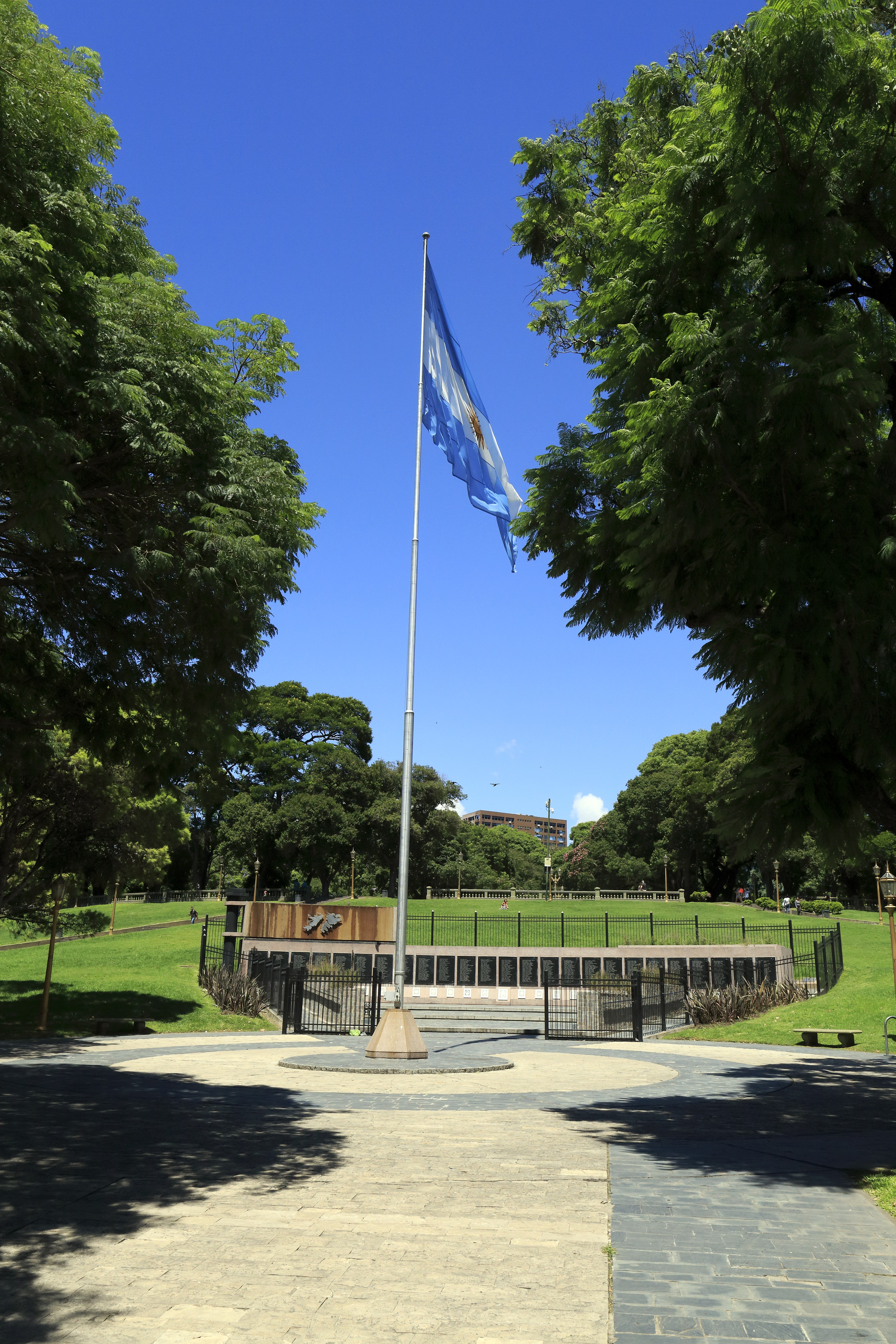 Plaza San Martín an der Avenida del Libertador, bis zum Torre Monumental, bis zum Falklandkrieg Torre de los Ingleses sind es weniger als zweihundert Meter. Falklandkriegsdenkmäler sind in Argentinien häufig. Dass dieser Krieg ein unverantwortliches Abenteuer der Generalität war, die nur deswegen möglich war, weil die Armeeführer Amtsträger der Militärdiktatur waren und gleichzeitig ihr Ende einleitete, ist in der argentinischen Öffentlichkeit offenbar weitgehend vergessen.